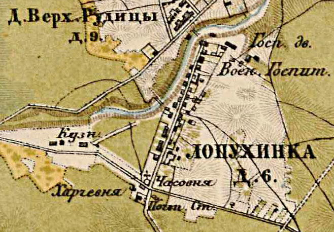 Деревня Лопухинка на карте 1885 года.